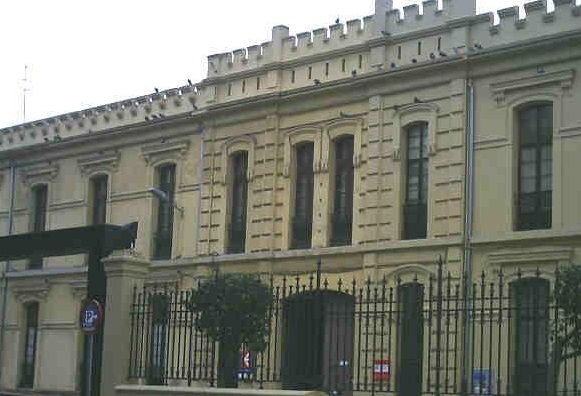 Cuartel de El Coto (Gijón)